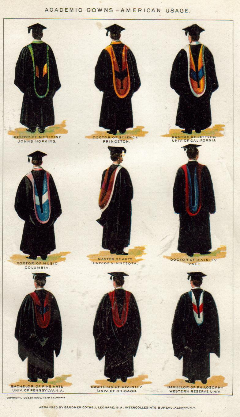 Painting